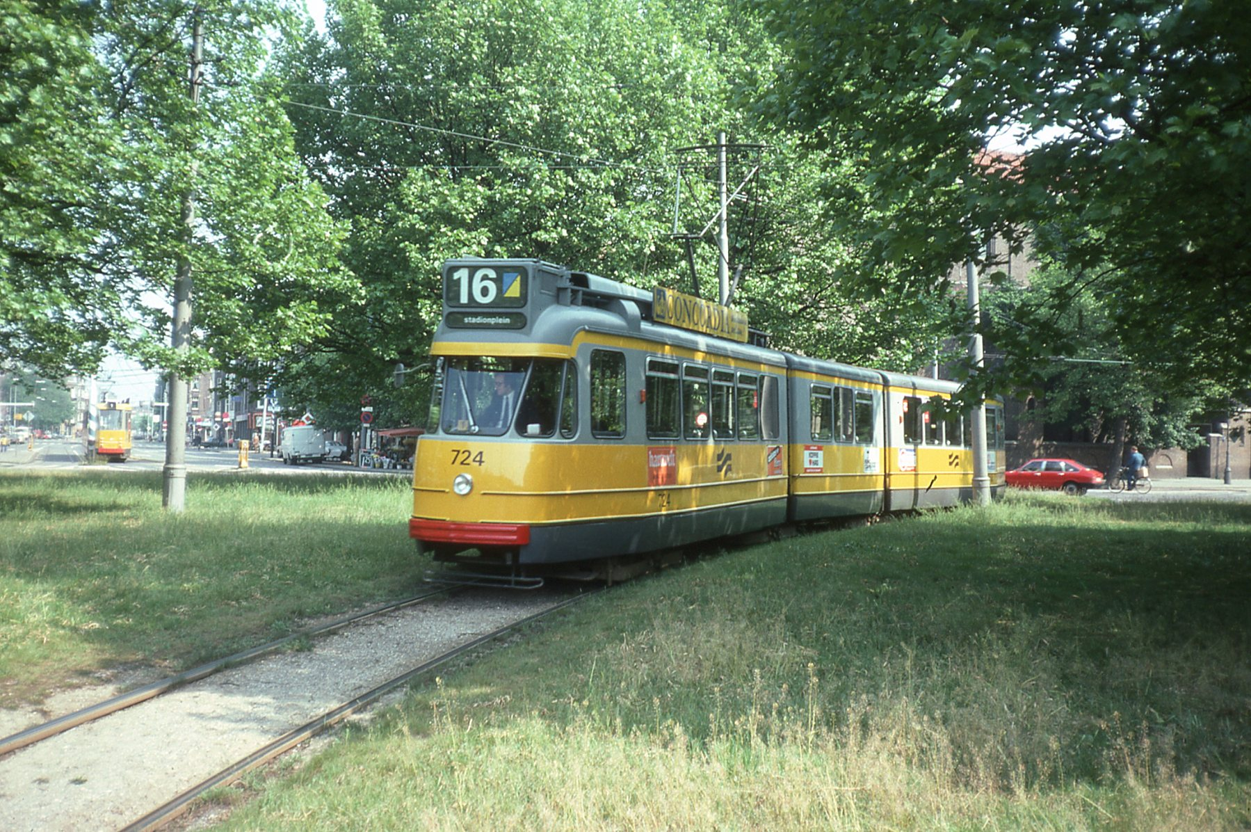 Photo. Trams aux Fils. Prise en juin 1976 Ligne 16 à Amstelveenseweg Tram 724